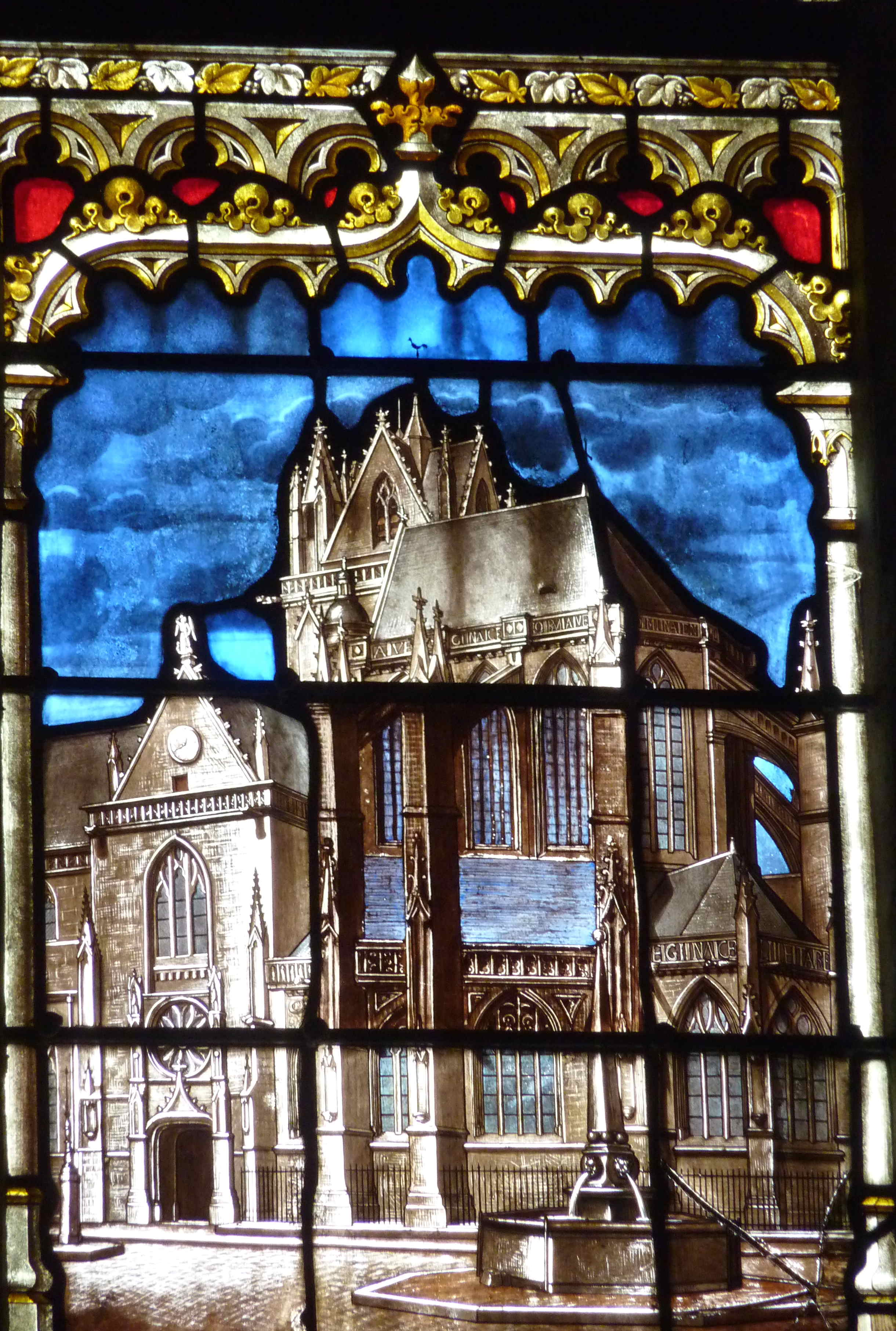 Katholische Pfarrkirche Notre-Dame-des-Marais in La Ferté-Bernard im Département Sarthe (Pays de la Loire/Frankreich), Bleiglasfenster mit Scheiben aus der zweiten Hälfte des 16. Jahrhunderts im Maßwerk, die anderen Scheiben von Eugène Hucher und Édouard Rathouis, von 1875/76 in der Glasmalereiwerkstatt der Karmeliten von Le Mans (Carmel du Mans) geschaffen; Darstellung: Herz Jesu, Papst Pius IX., Petersdom, Stifter; Ausschnitt: Kirche Notre-Dame-des-Marais